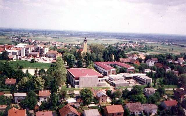 Vrbovec - panorama Grada Vrbovca iz aeroplana